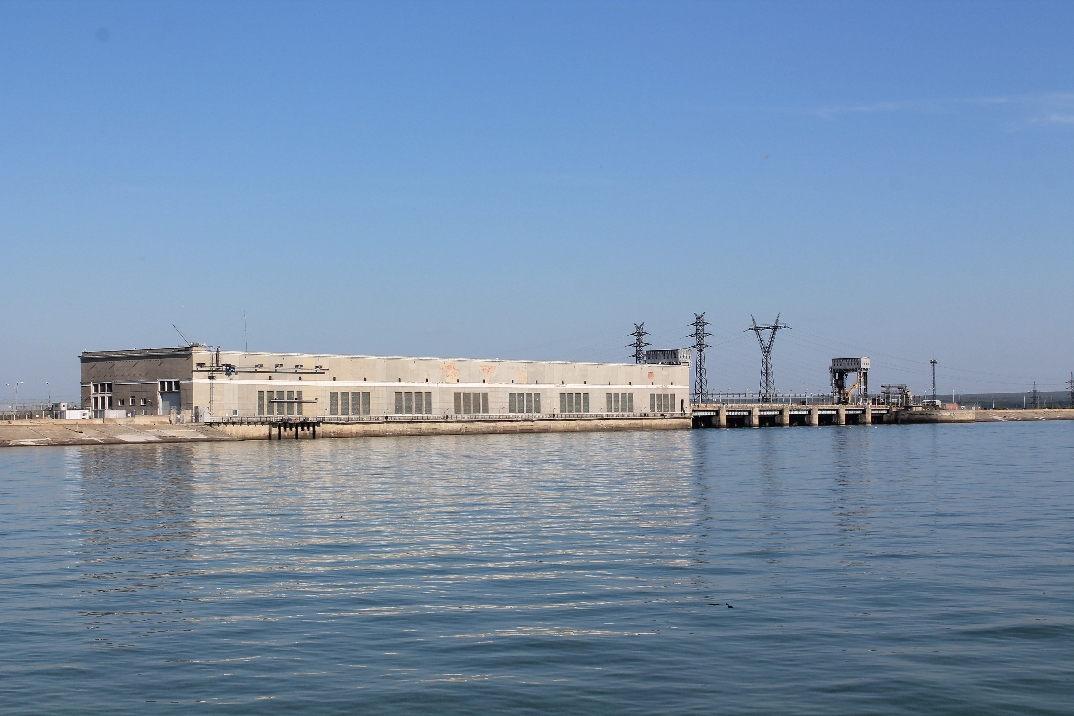 Вид на ОбьГЭС с набережной